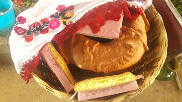 Canasta de pan